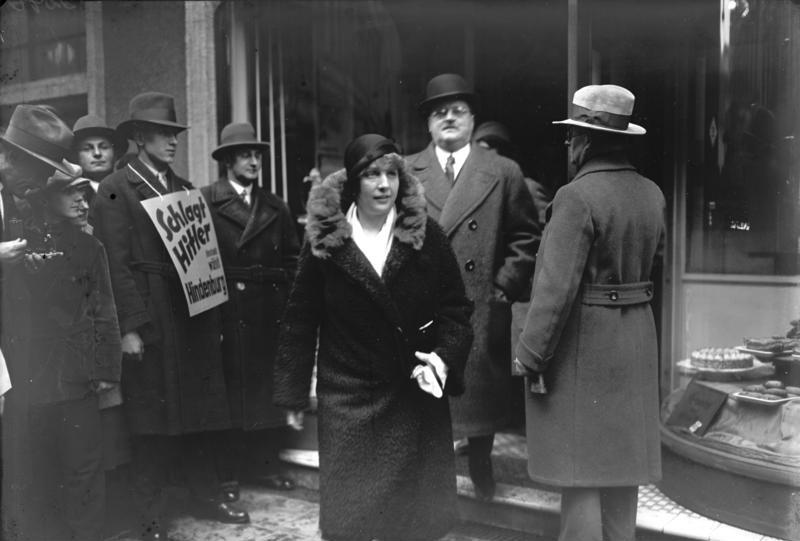 Reichspräsidentenwahl in Berlin ! Staatssekretär Dr. Meissner, die rechte Hand des Reichspräsidenten von Hindenburg, verlässt nach der Abstimmung das Wahl-Lokal.